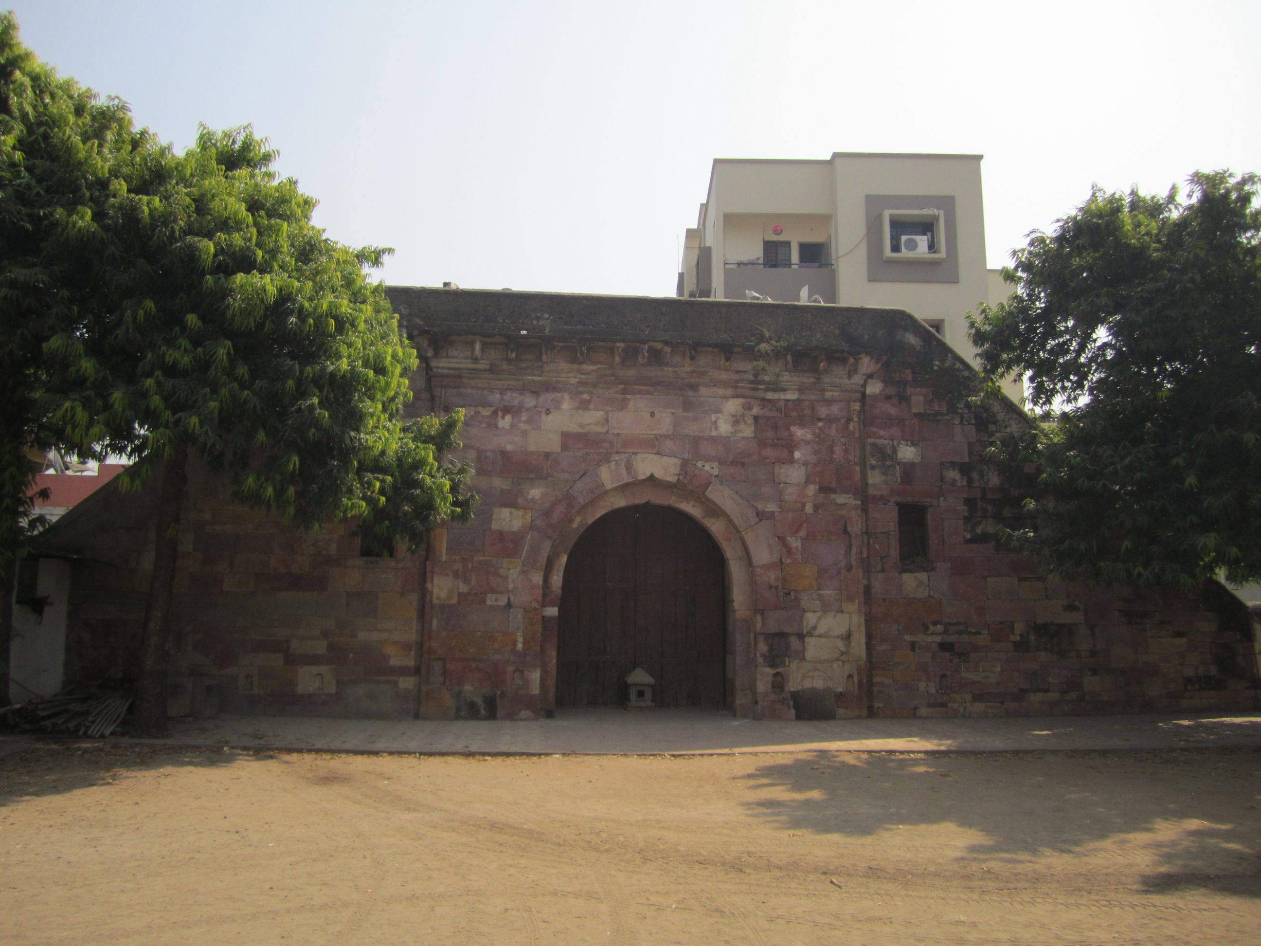 राष्ट्रीय स्वयंसेवक संघ main office